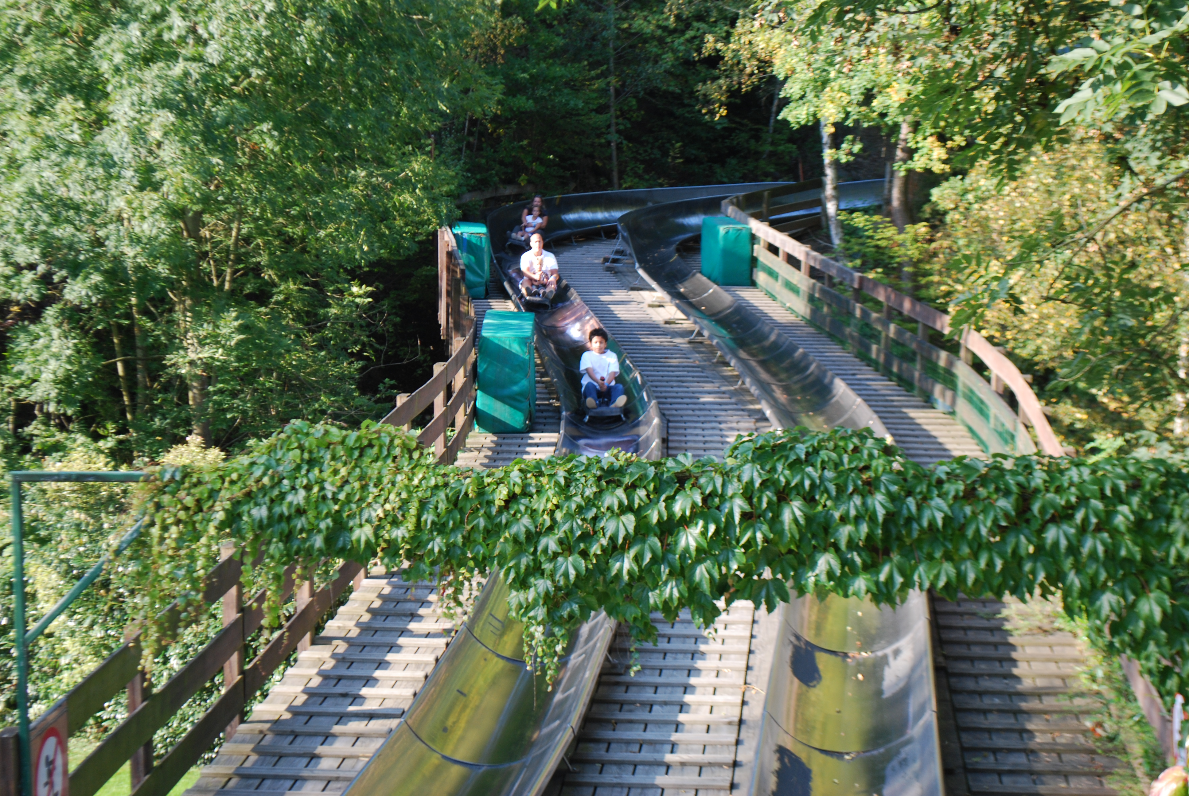 Vue de la piste de luge d'été de Plopsa Coo.